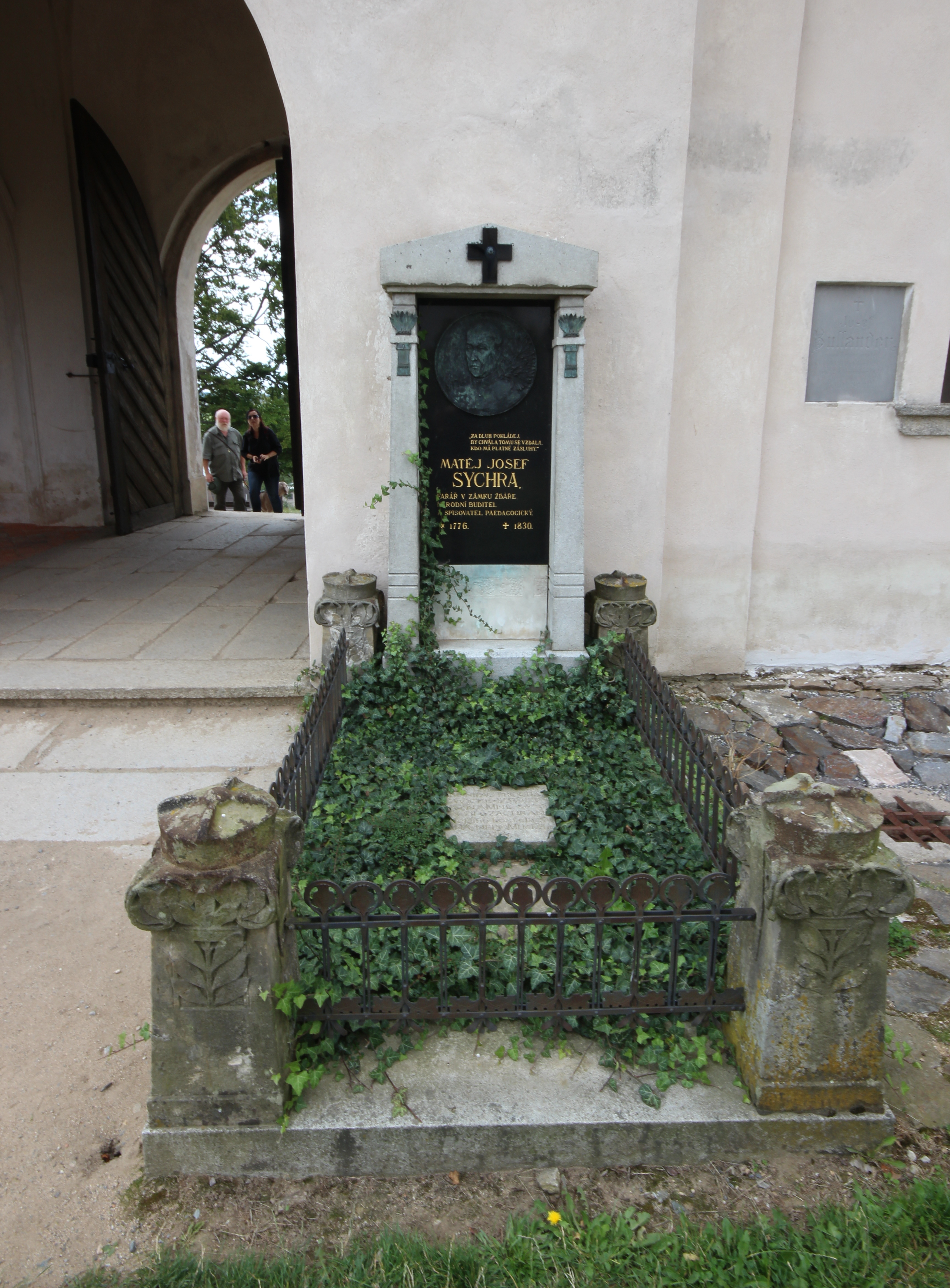 Poutní kostel sv. Jana Nepomuckého na Zelené hoře.